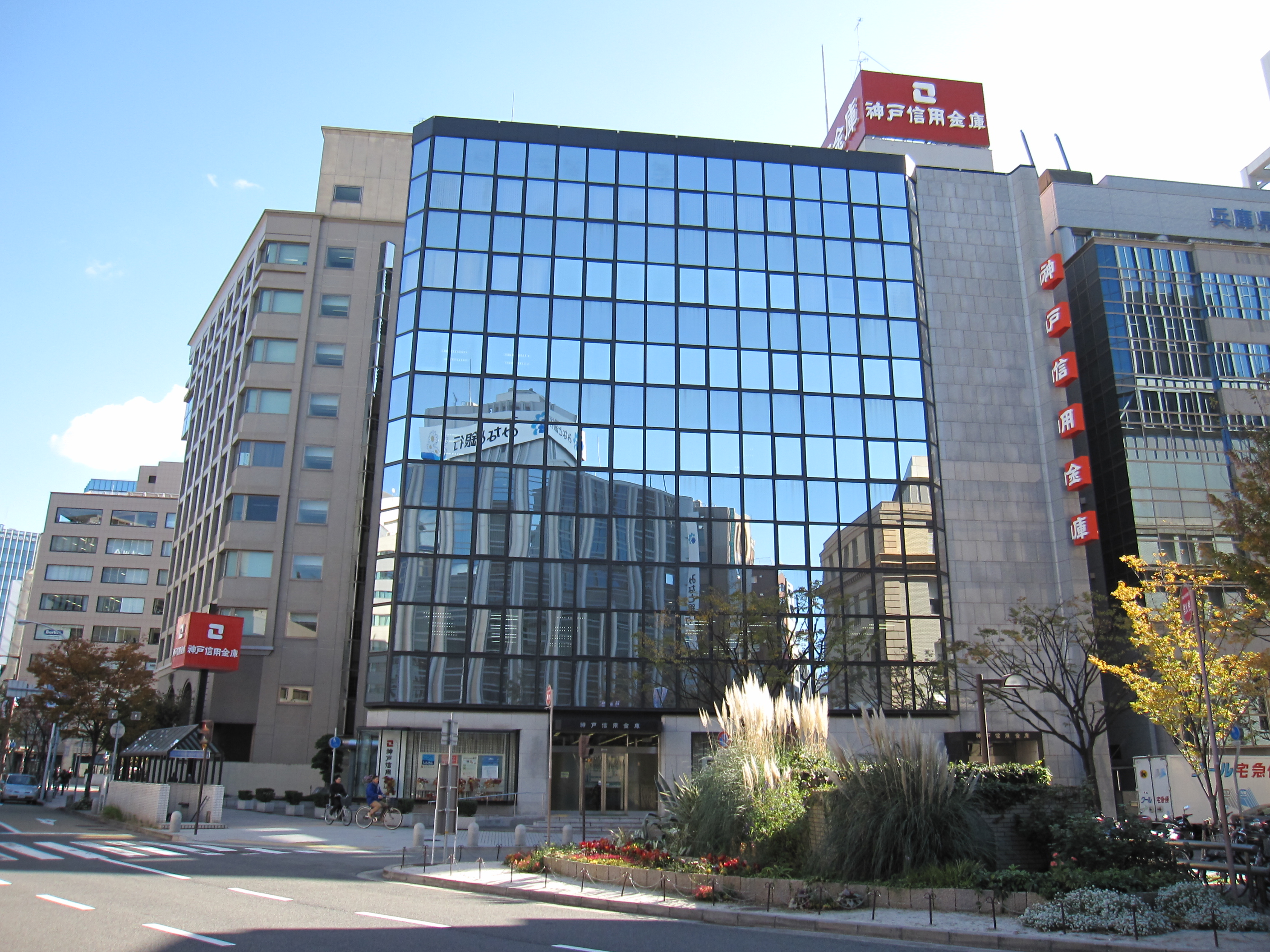 神戸信用金庫本店